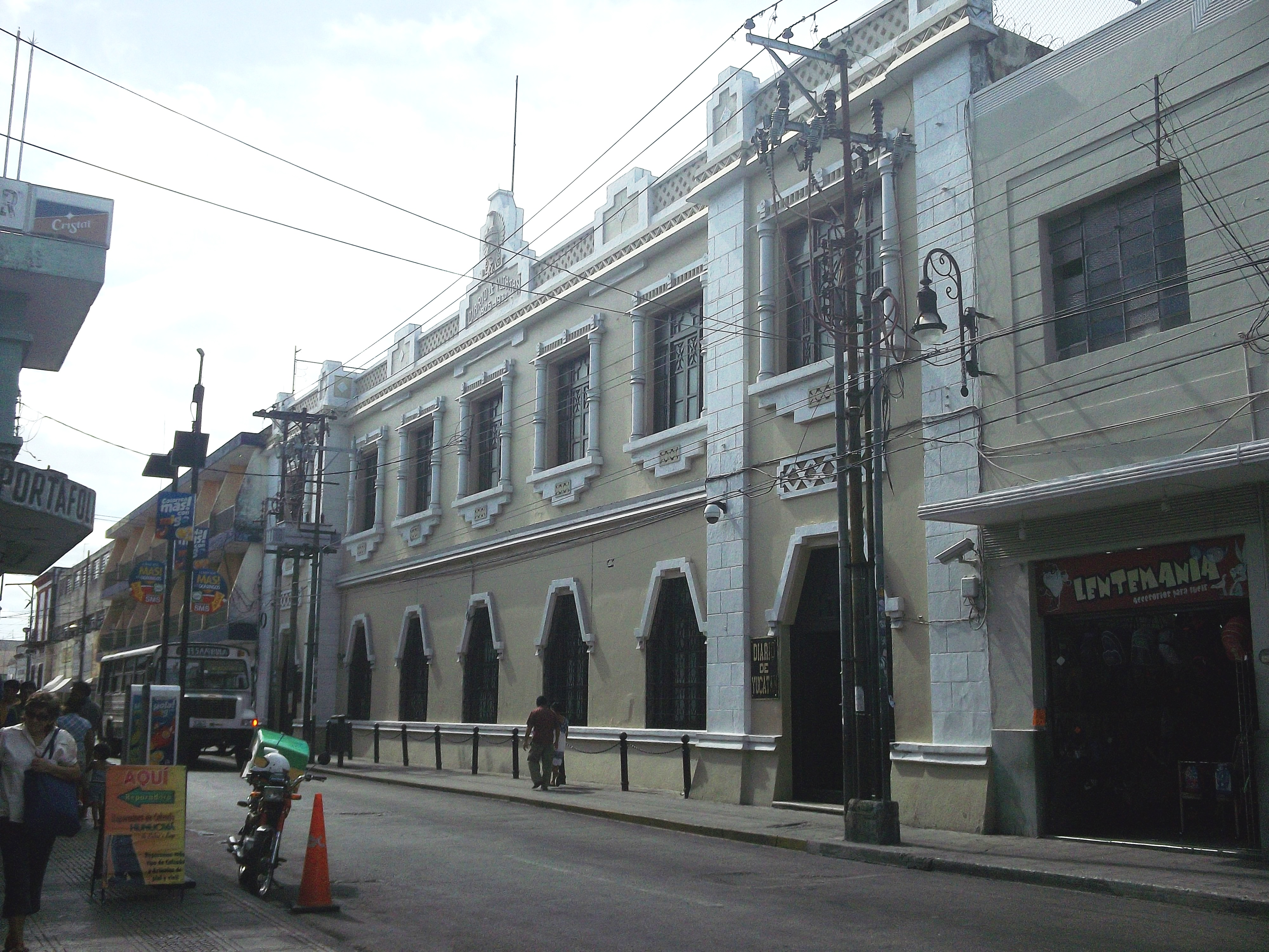 Diario de Yucatán en Mérida, Yucatán